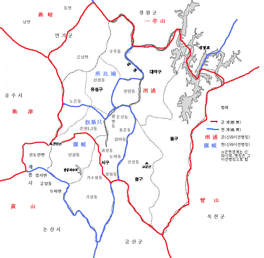 고대 대전 개략도